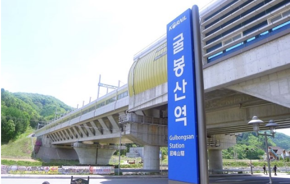 굴봉산역 전경